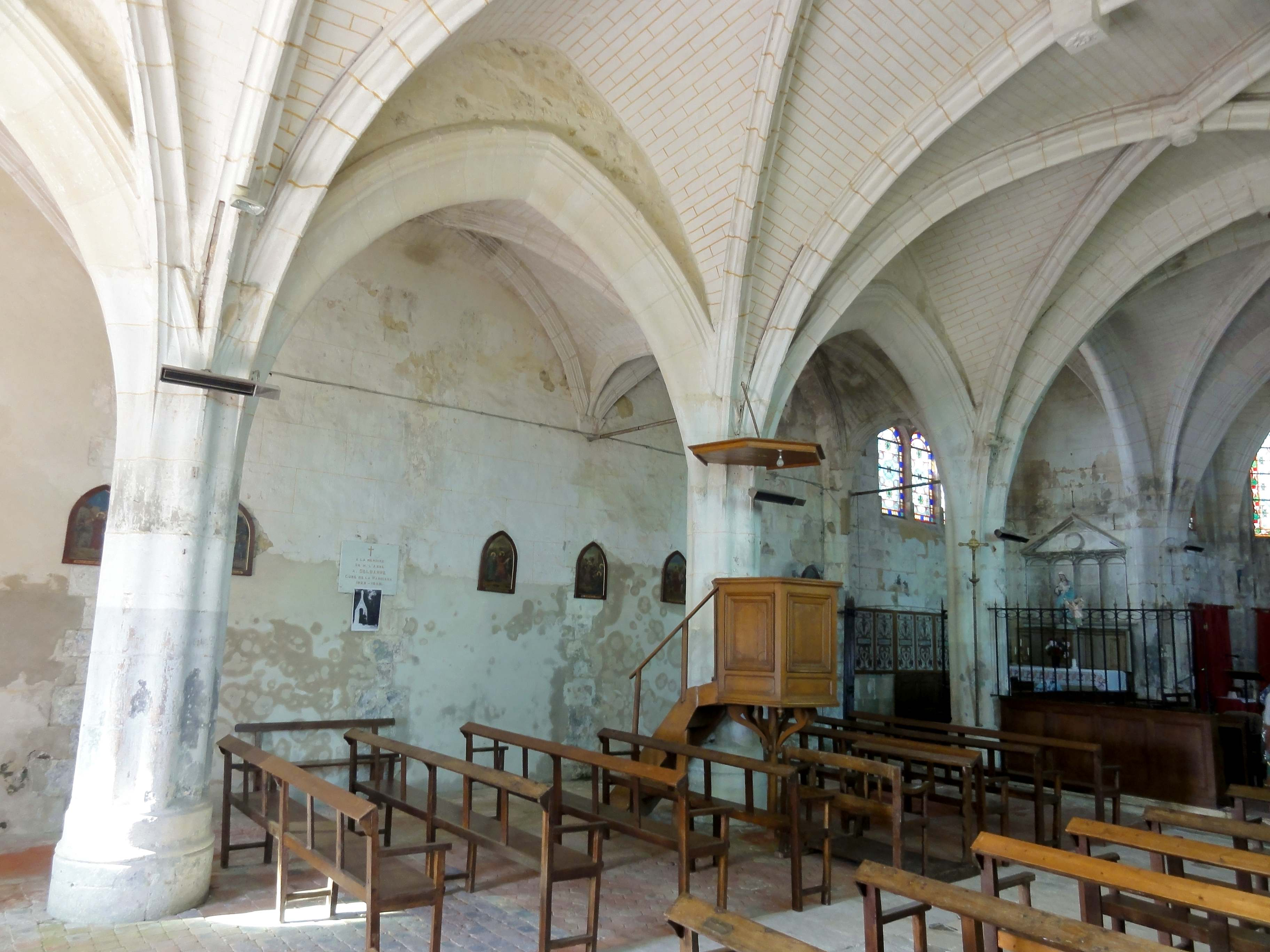 Intérieur de l'église Saint-Wandrille de Rivecourt (voir titre).